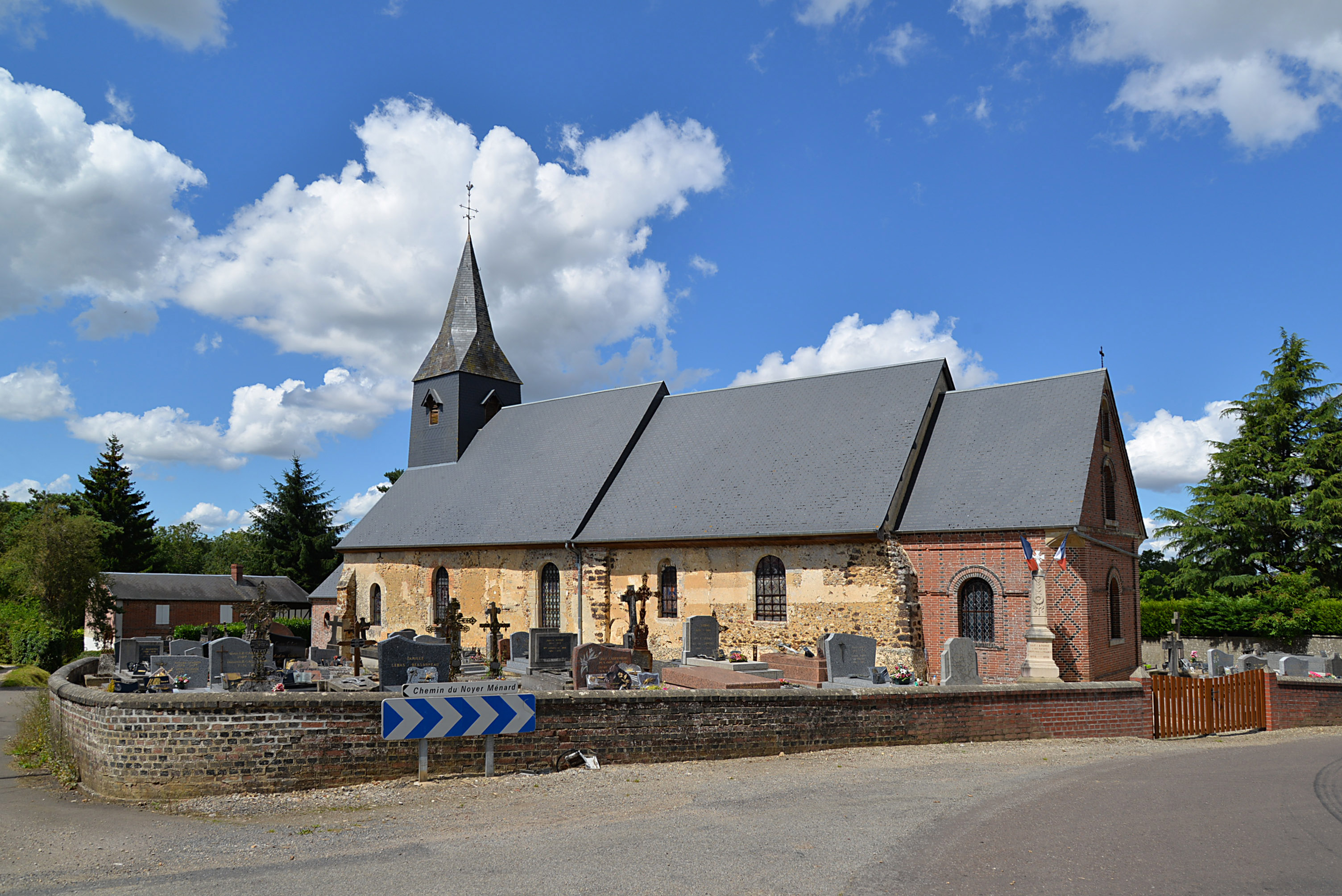 Le Sap-André (Orne)